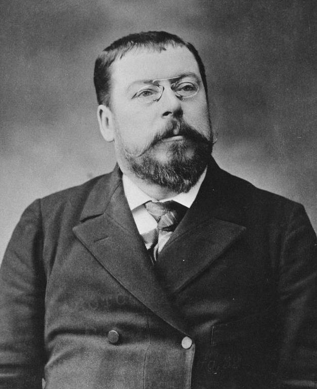 "Foursin, Pierre, Alexandre, né le 10 février 1852 à Courtils (Manche) élu le 13 mai 1900".